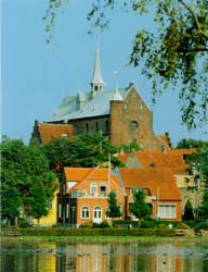 Haderslev Domkirke set fra Haderslev Dam.